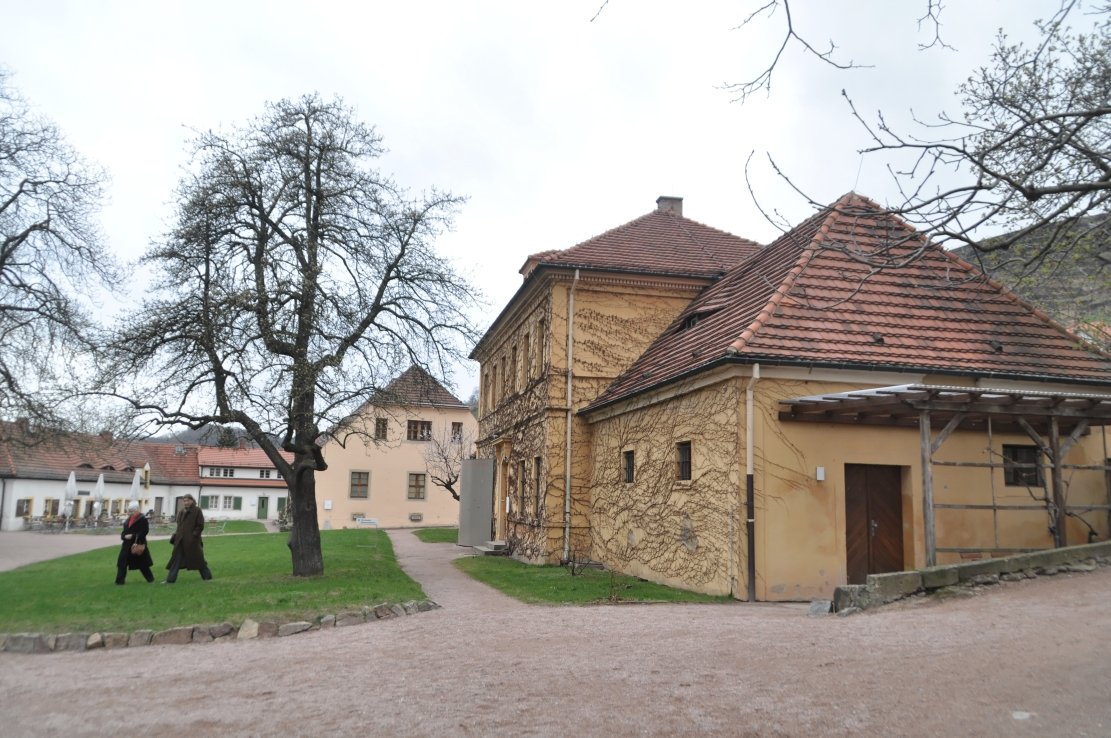 Bilder von Wiki Loves Monuments 2012 Kickoff-Seminar in Dresden